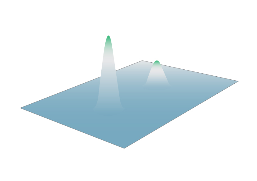 다세계 해석에서는 파동함수의 확률만큼의 비율로 모든 세계가 현실화 되므로 한 세계에서의 확률의 의미는 모호해진다.